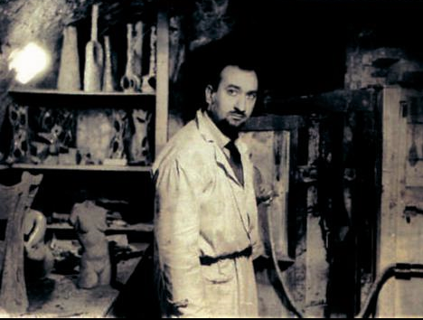 Valentino T. Petri nel suo studio